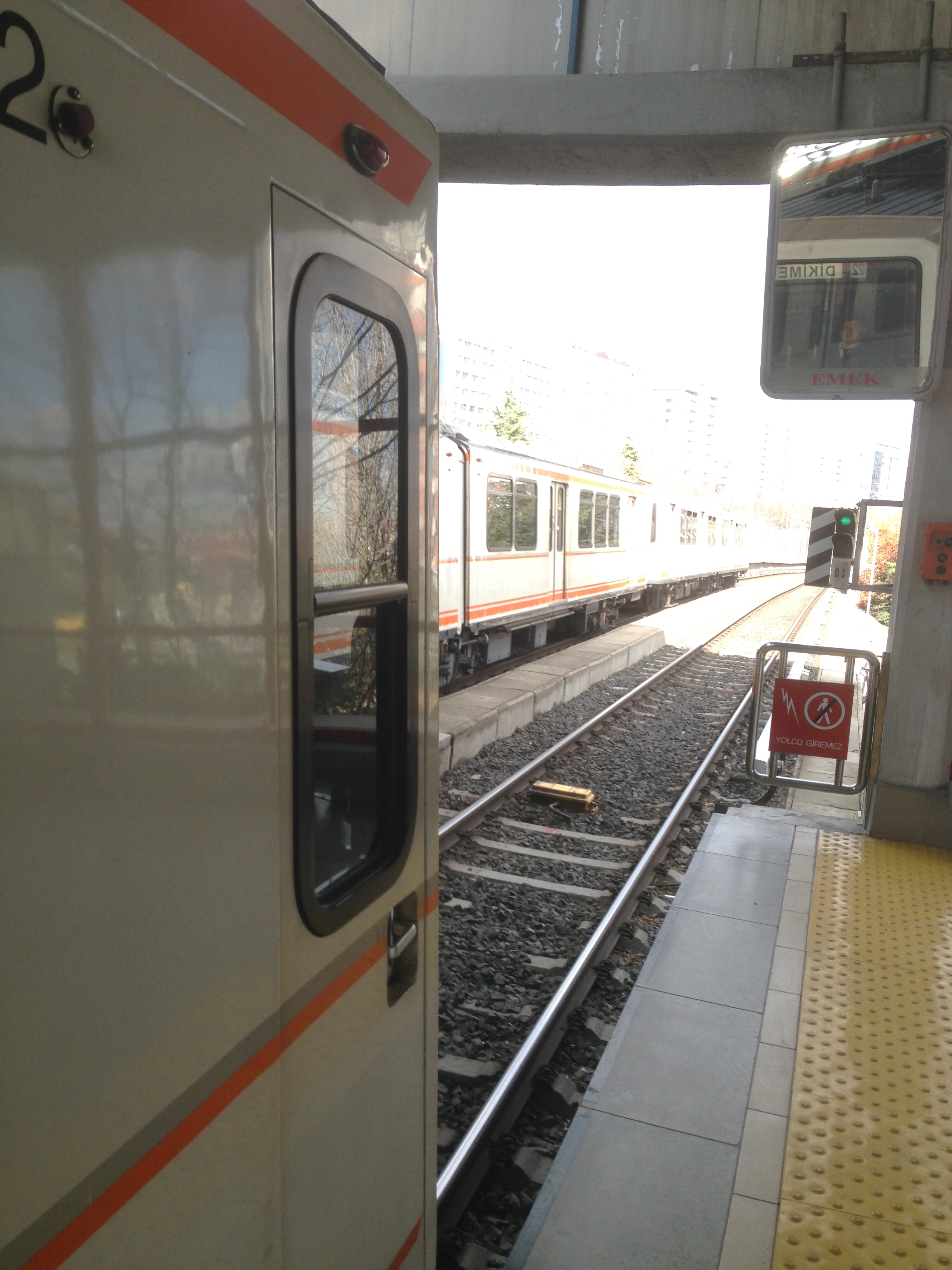 ankaraydan görüntüler ankara